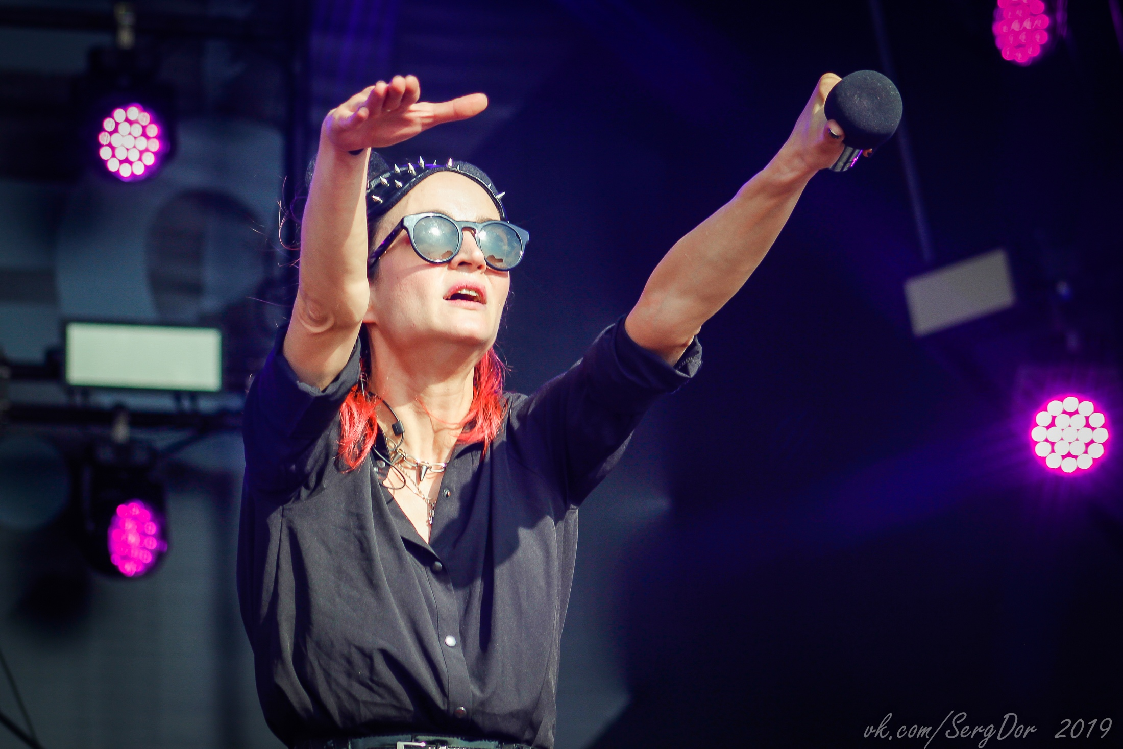 Людмила Махова (гр. Дайте Два) на фестивале Нашествие-2019